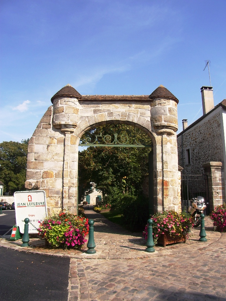 Porte de la Grande Bouvêche, Orsay